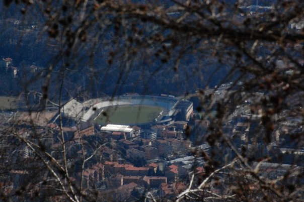 Stadio Franco Ossola in Varese, Italy